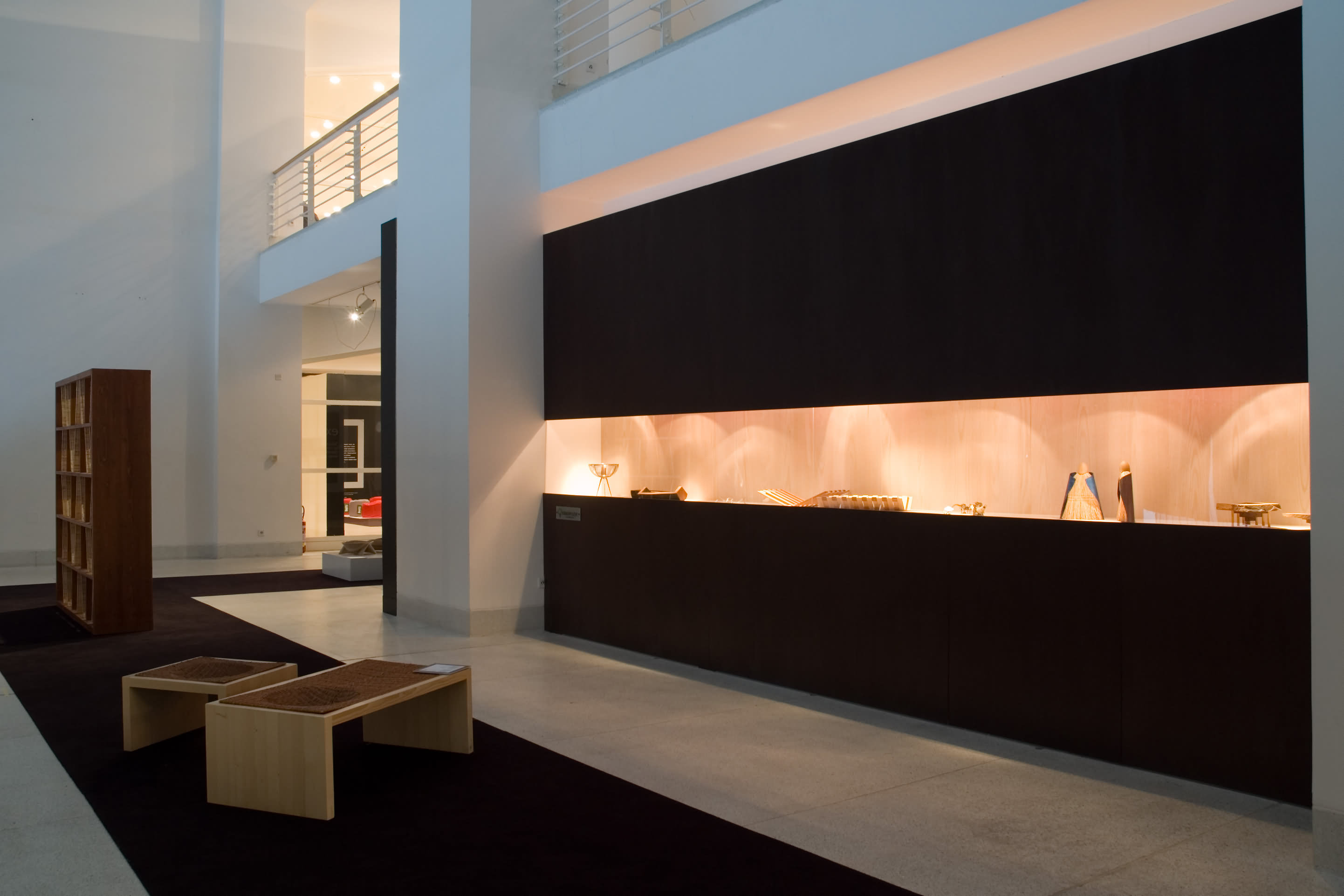 Výstava Design Match, Národní galerie v Praze, 2008